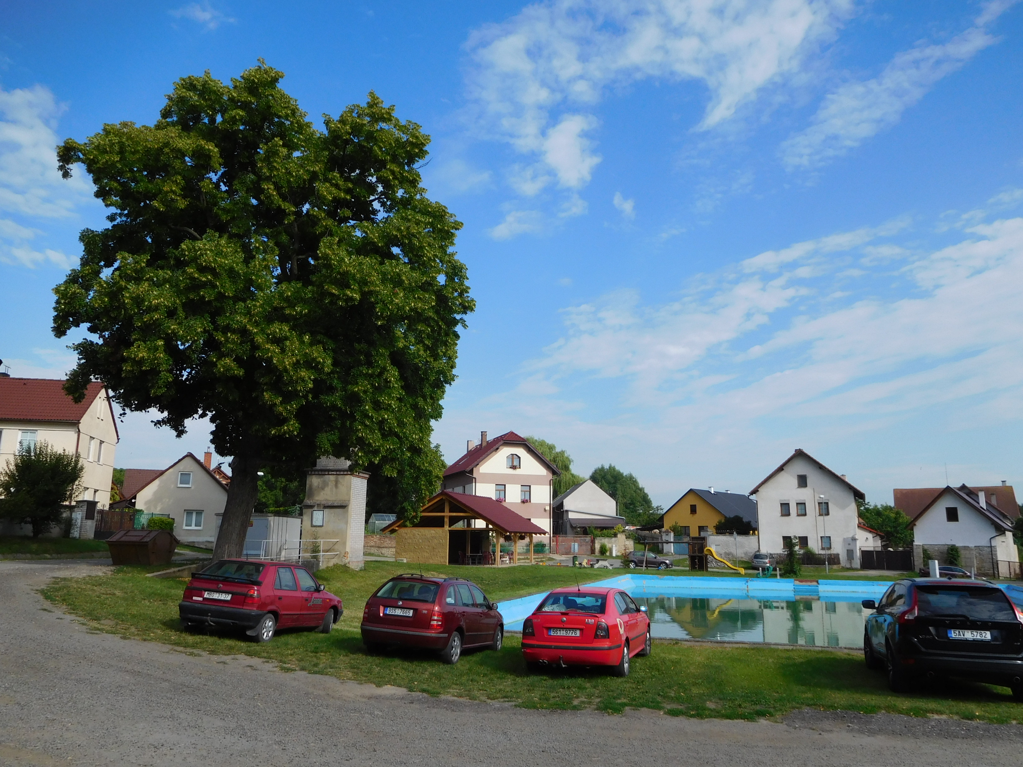 Řehnice - náves